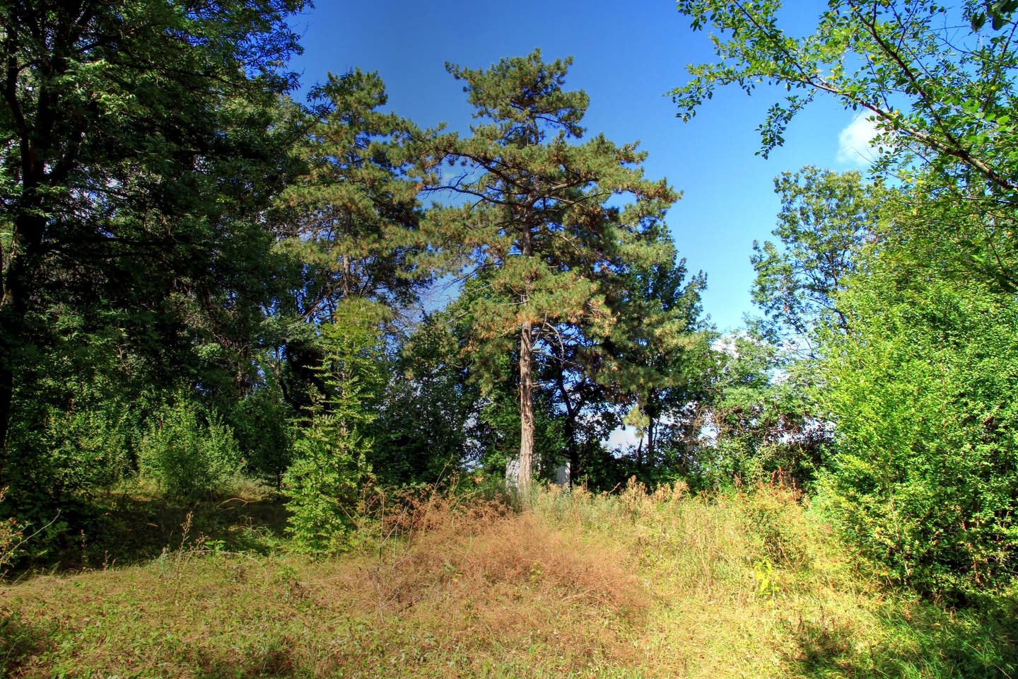 Столниченский парк, монумент природы, находится в Единецкий район, с. Столничень (код MD-ED-map-015)